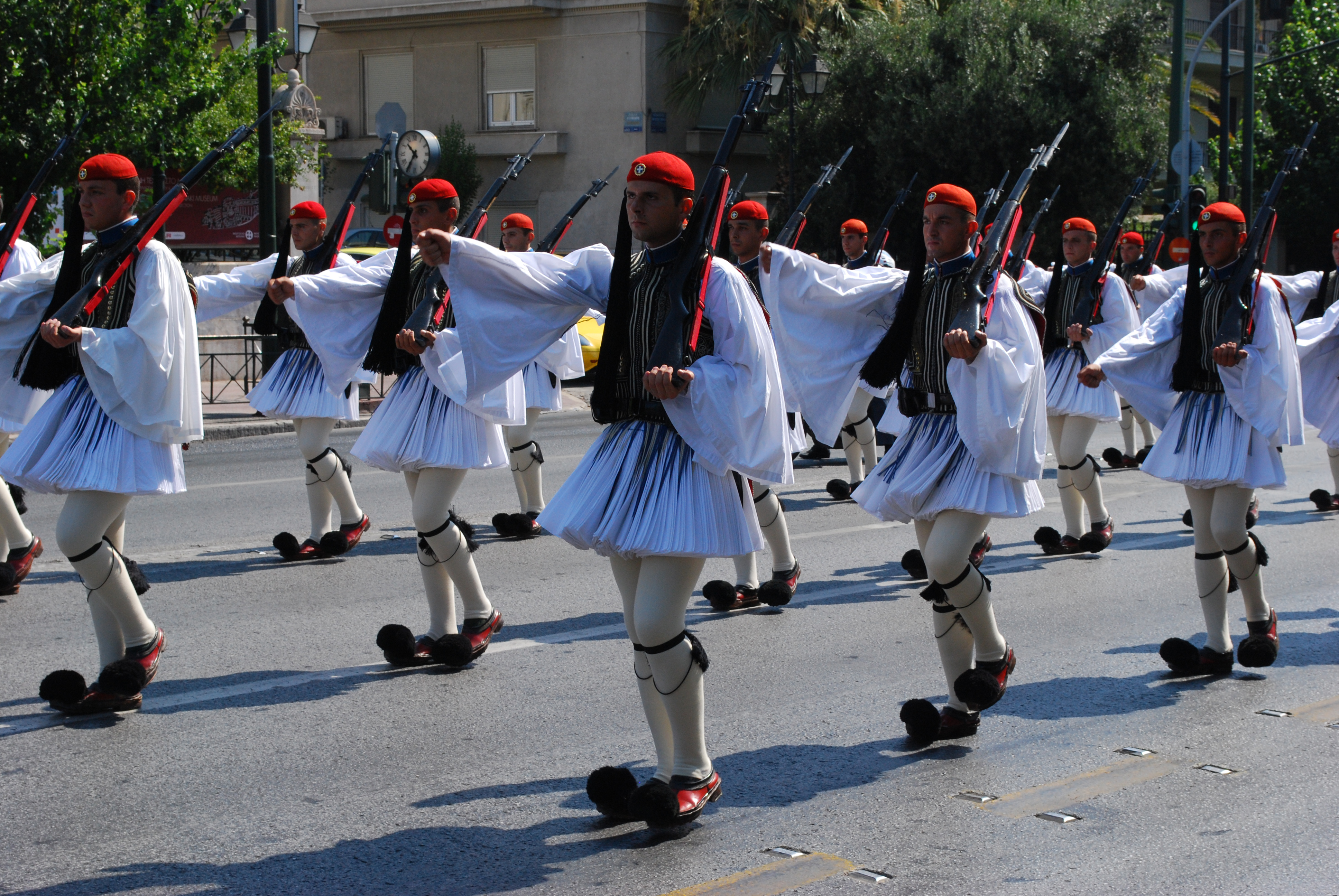 La relève de la garde au parlement grec, le dimanche 2 août 2009, à Athènes.